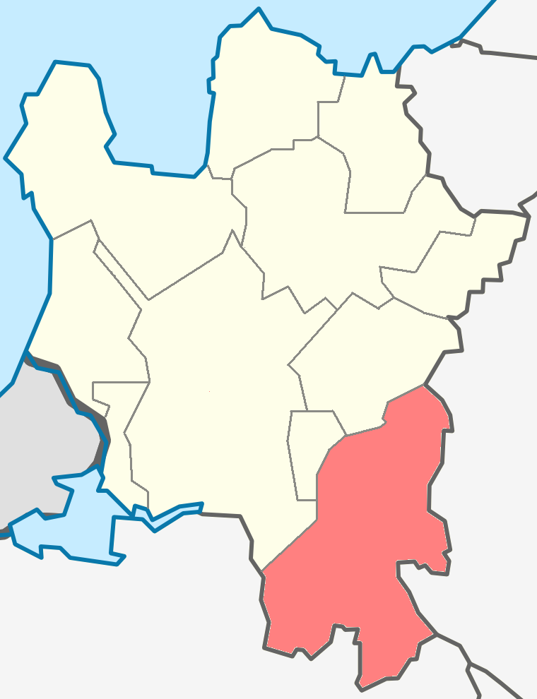 Пустомержское сельское поселение на карте Кингисеппского района